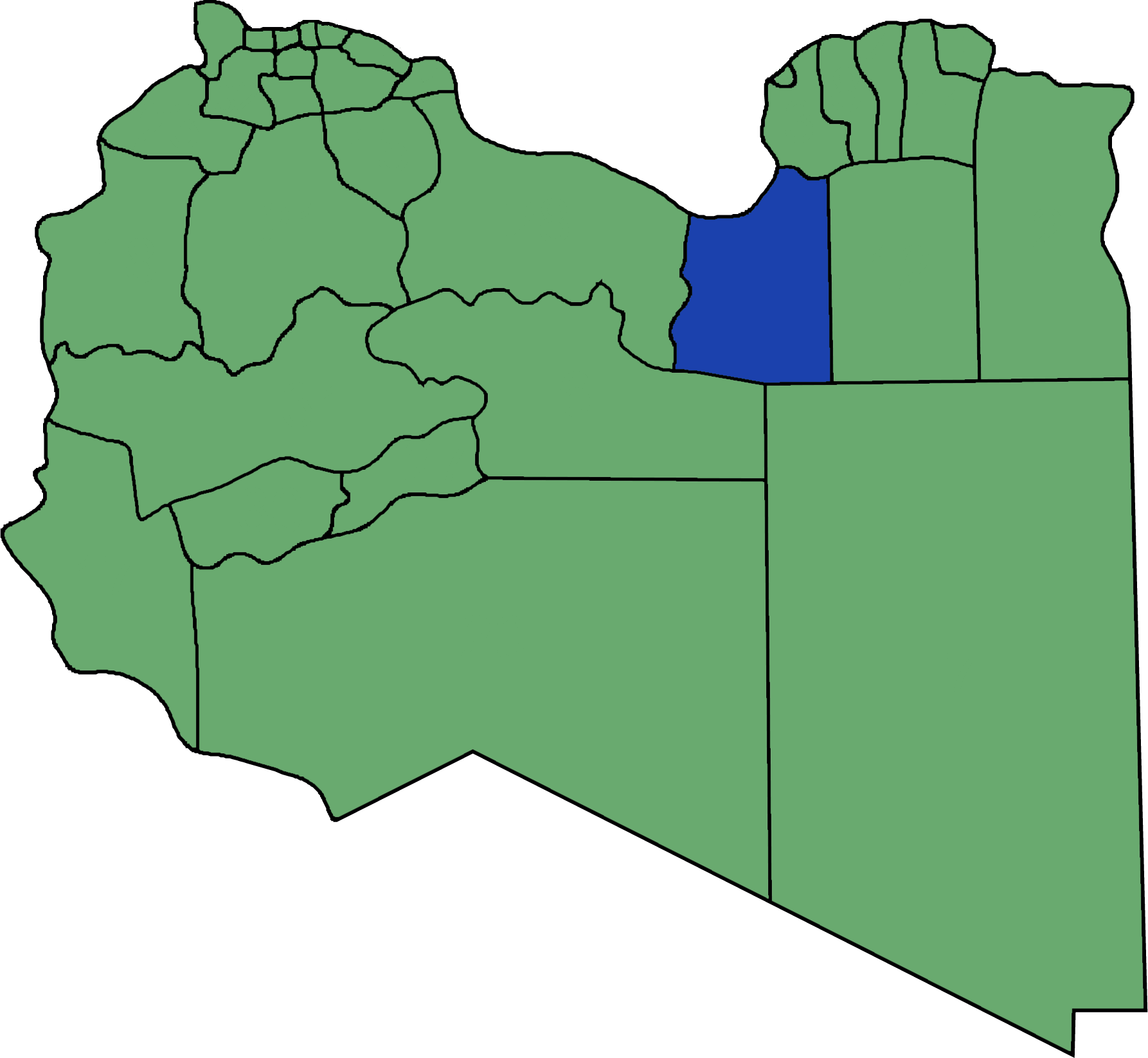 Die neuen Gemeinden (Munizipien) in Libyen. Ajdabiya hervorgehoben.